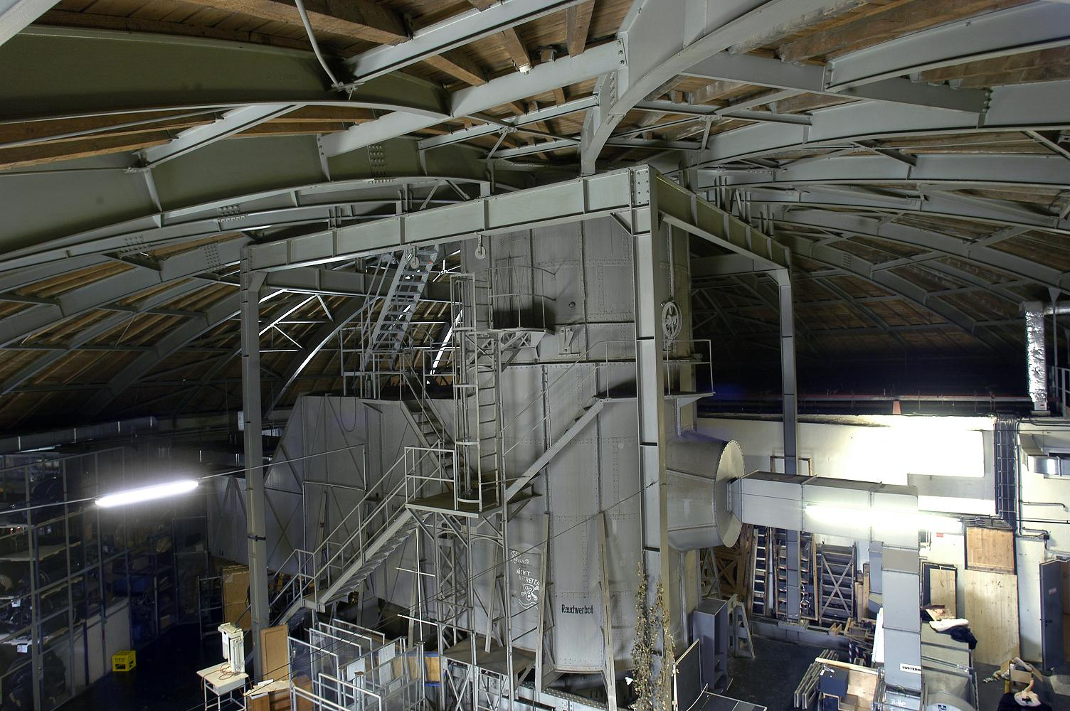 Lusterboden des Burgtheaters, Wien